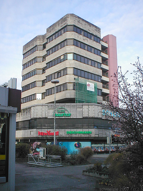 Büroturm des Wollhaus-Zentrums in Heilbronn